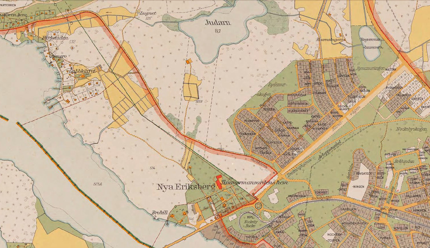 Nockebyhov på Karta "Äppelviken" från 1917-1933